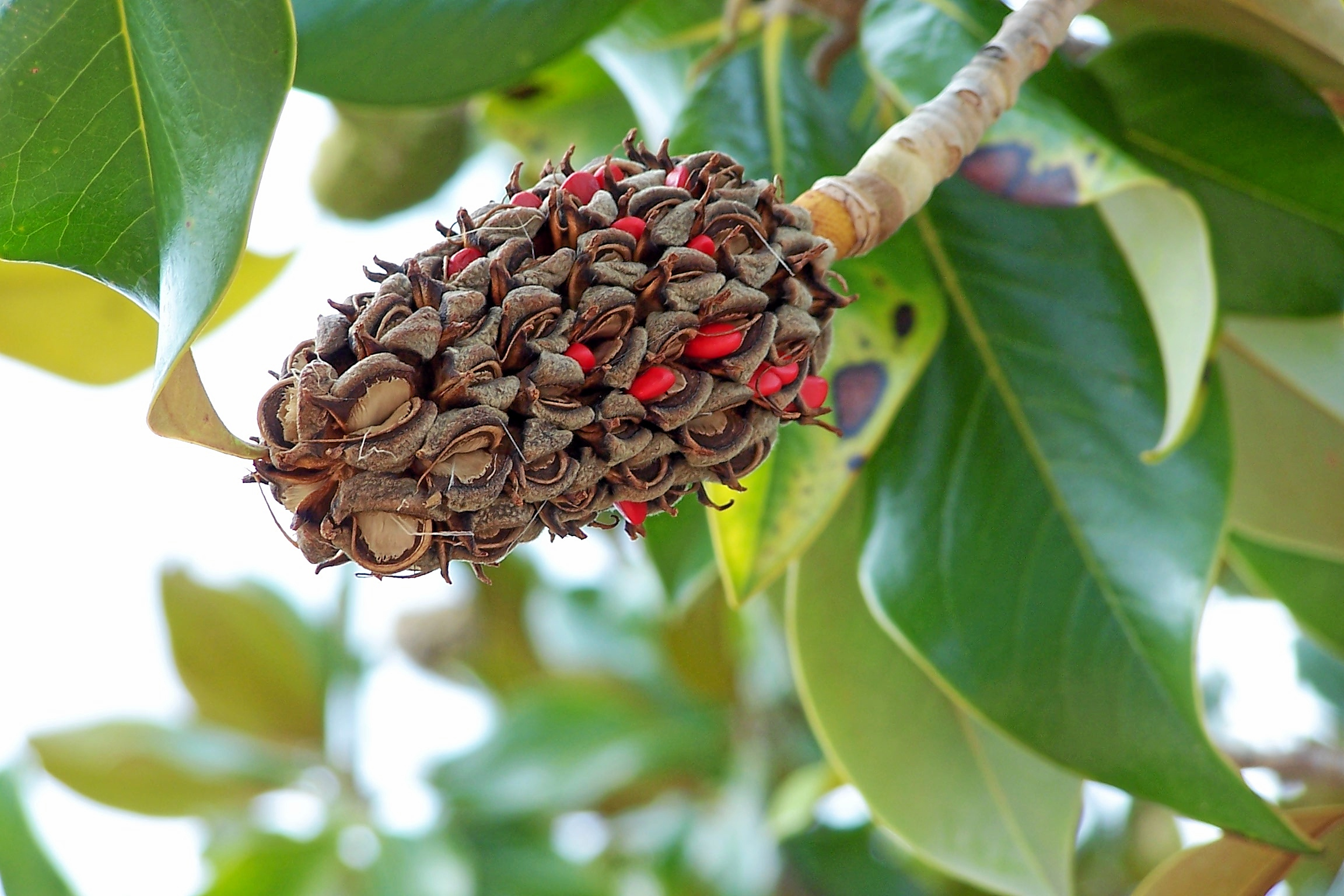 Immergrüne Magnolie, Magnolia grandiflora, Monaco, Monte Carlo.